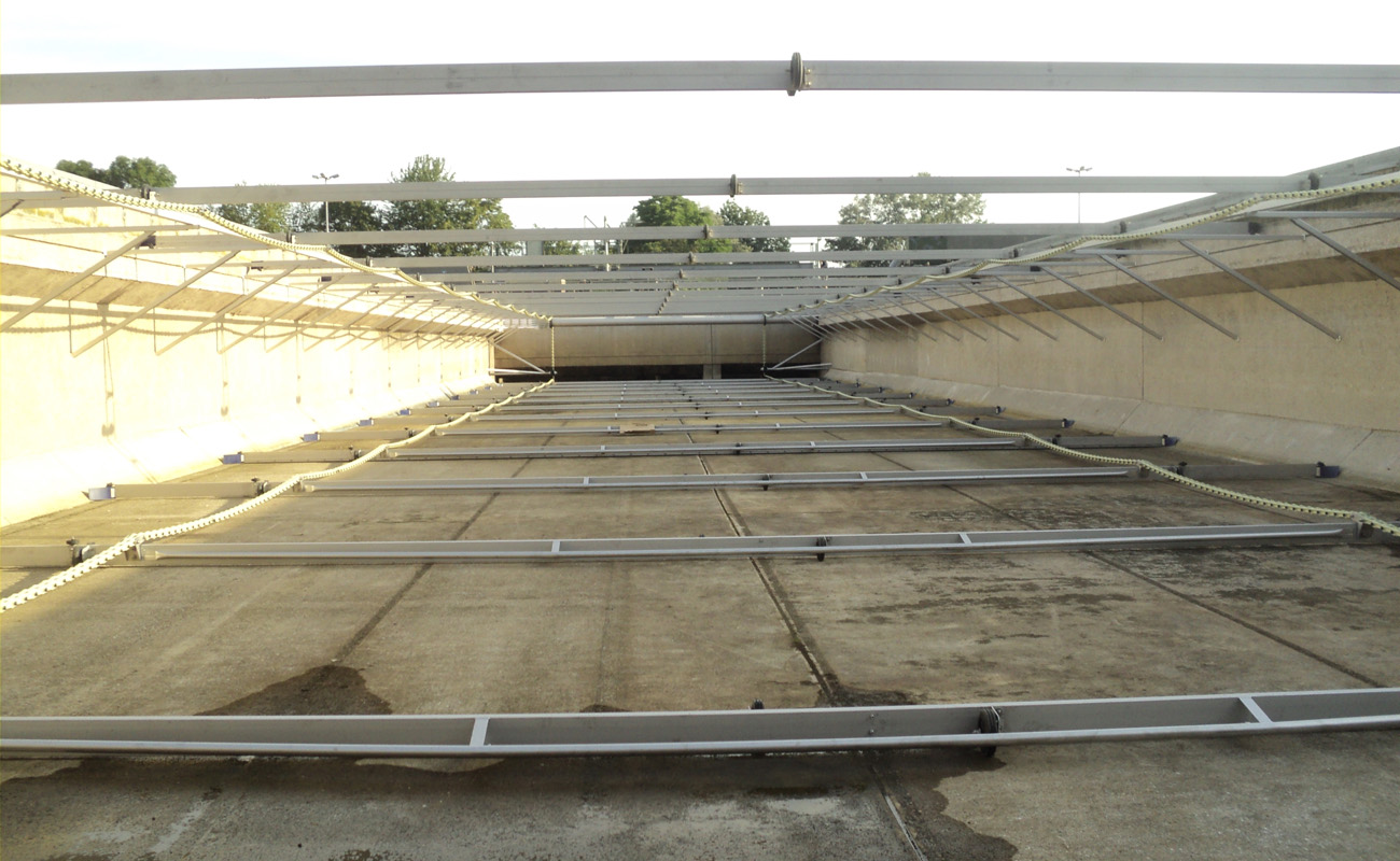 Kettenräumer mit Kunststoff-Förderketten und Edelstahl-Räumbalken in einem 15m breiten und 72m langen Nachklärbecken; Kläranlage Trier